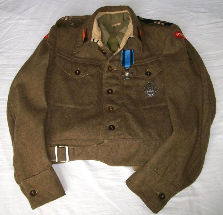 Battledress plutonowego 1 Pułk Artylerii Przeciwpancernej - rekonstrukcja (kolekcja D.&T. Bienek)